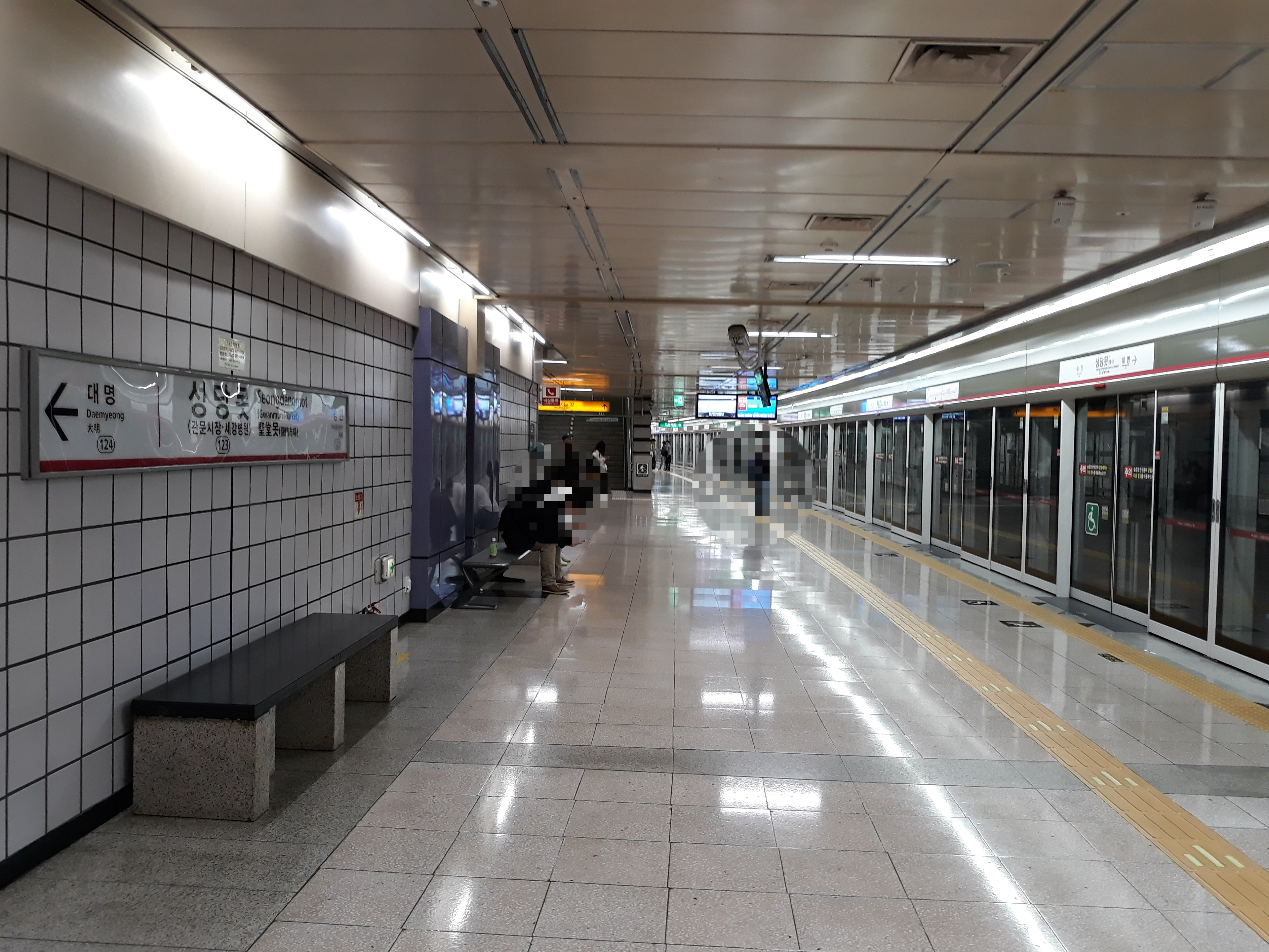 대구 도시철도 1호선 성당못역 안심 방면 승강장